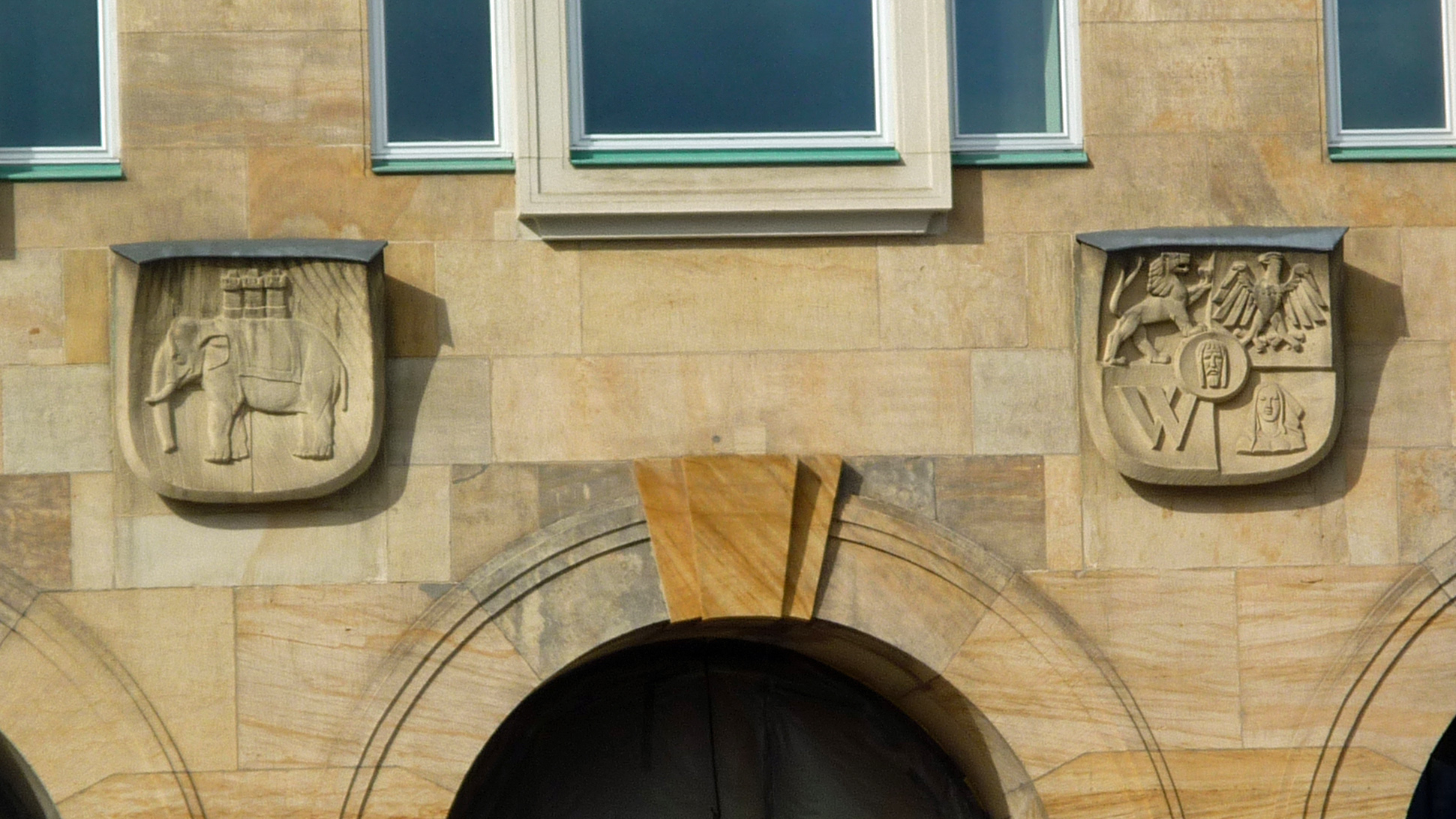 Wappen Dresden und seinen Partnerstädten, hier Coventry und Breslau